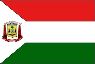 Bandeira do municipio de Várzea Grande Mato Grosso